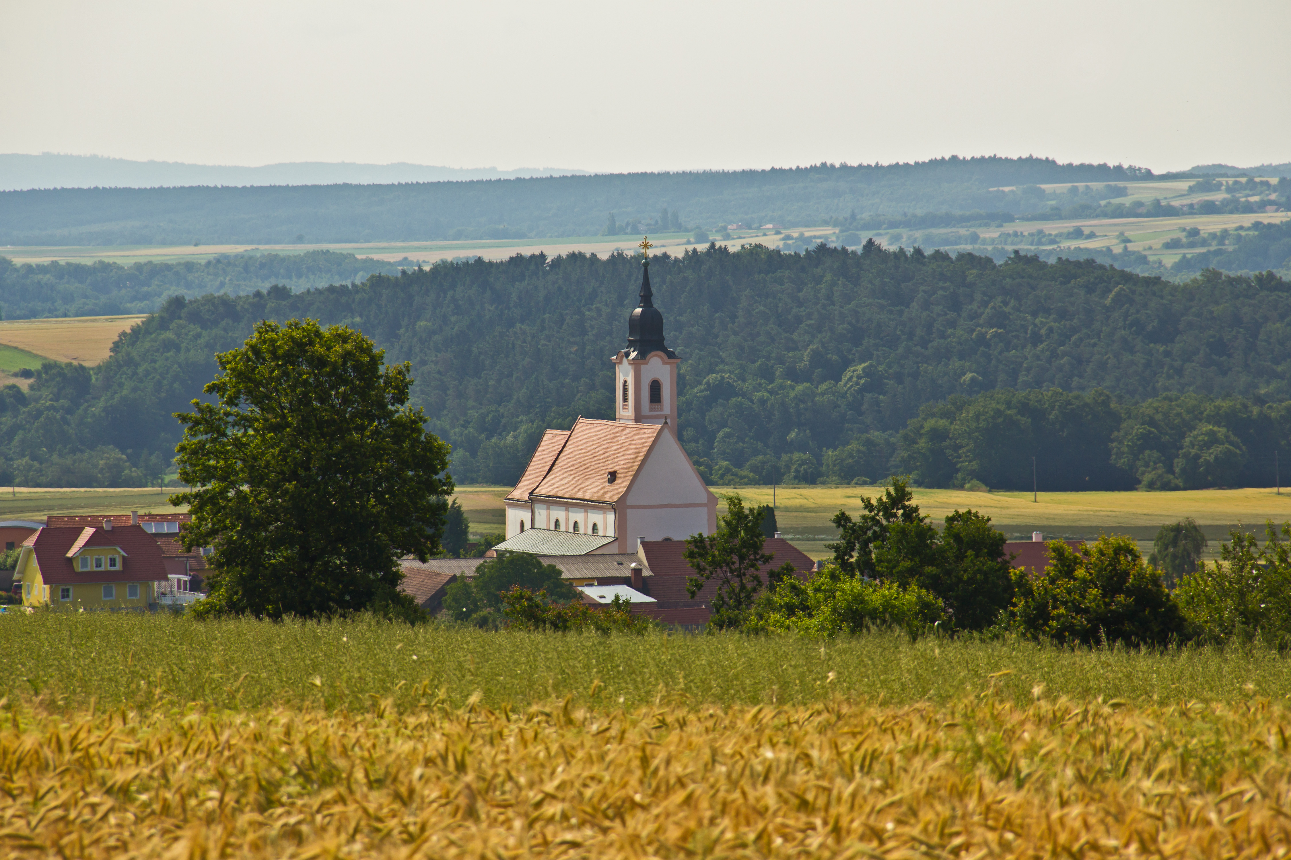 Die Marienkirche in St. Marein ist eine ehemalige Wallfahrtskirche, die dem Stift Altenburg inkorporiert ist.